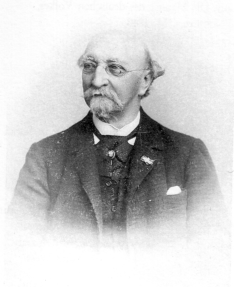 Carl Schorn (1818-1900), Abgeordneter der Paulskirche